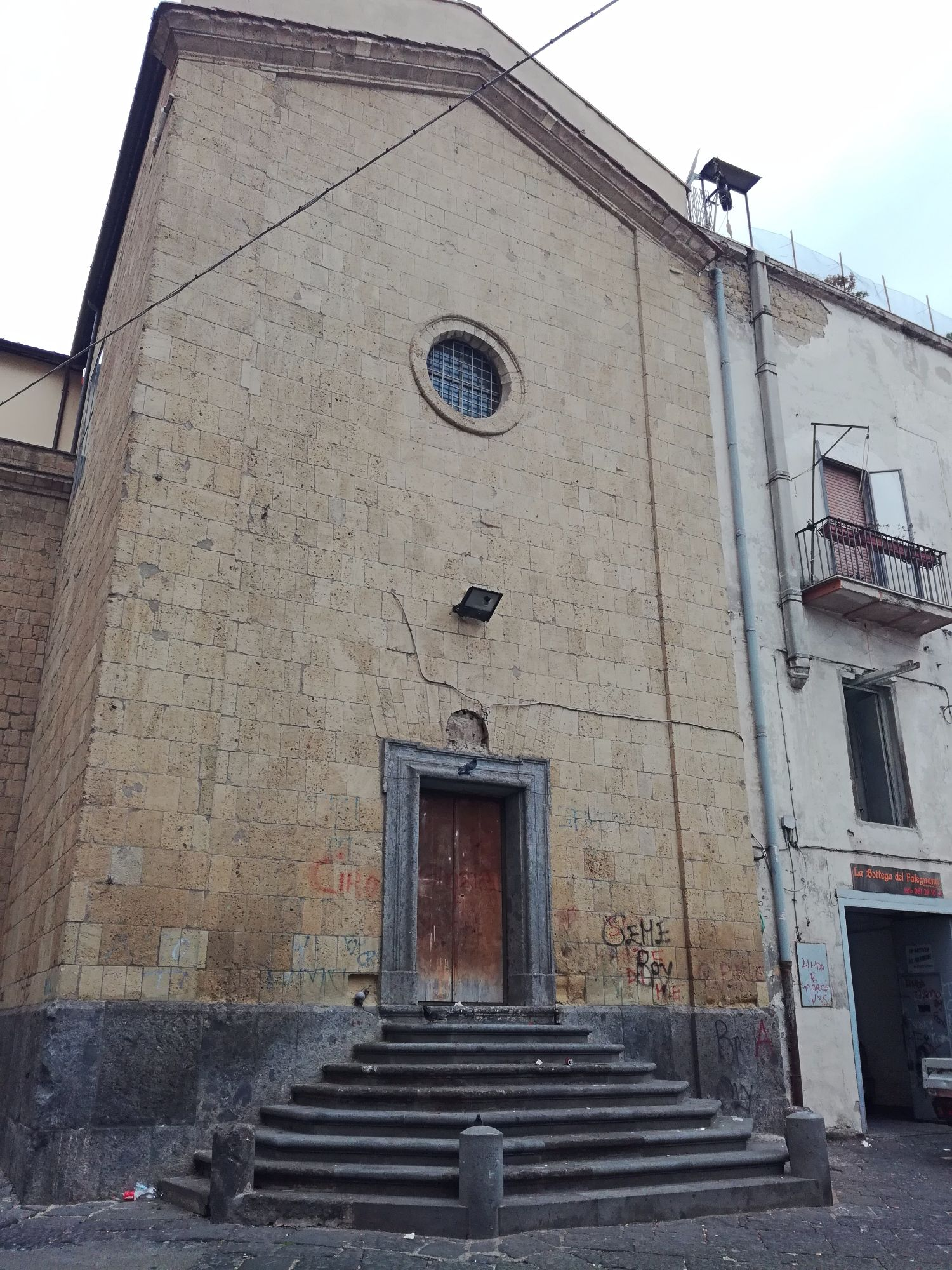 Aniello Maggiore (Napoli)